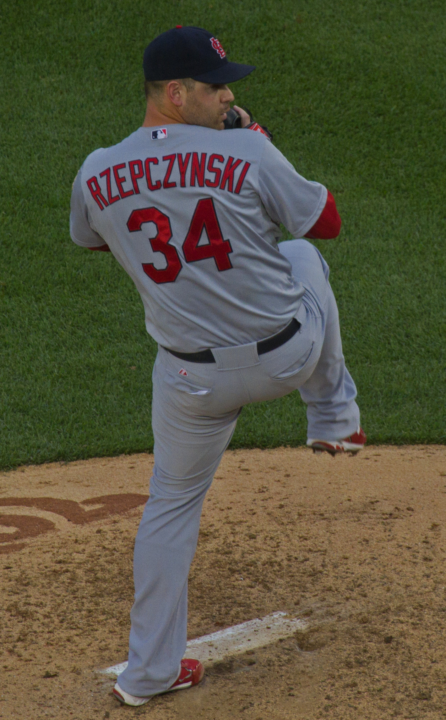 Marc Rzepczynski